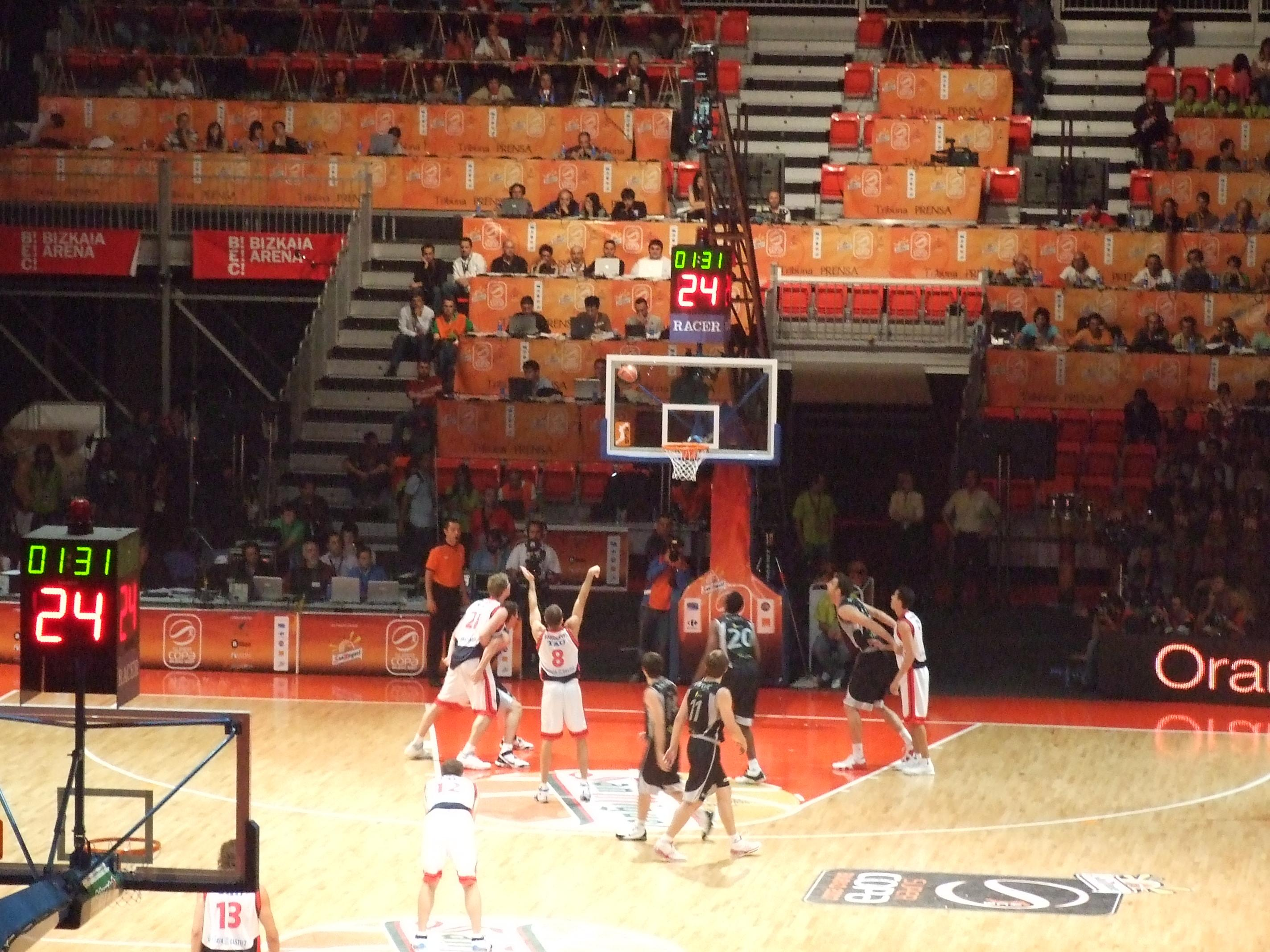 Final de la Supercopa de España 2007 entre el Iurbentia Bilbao y el TAU Cerámica